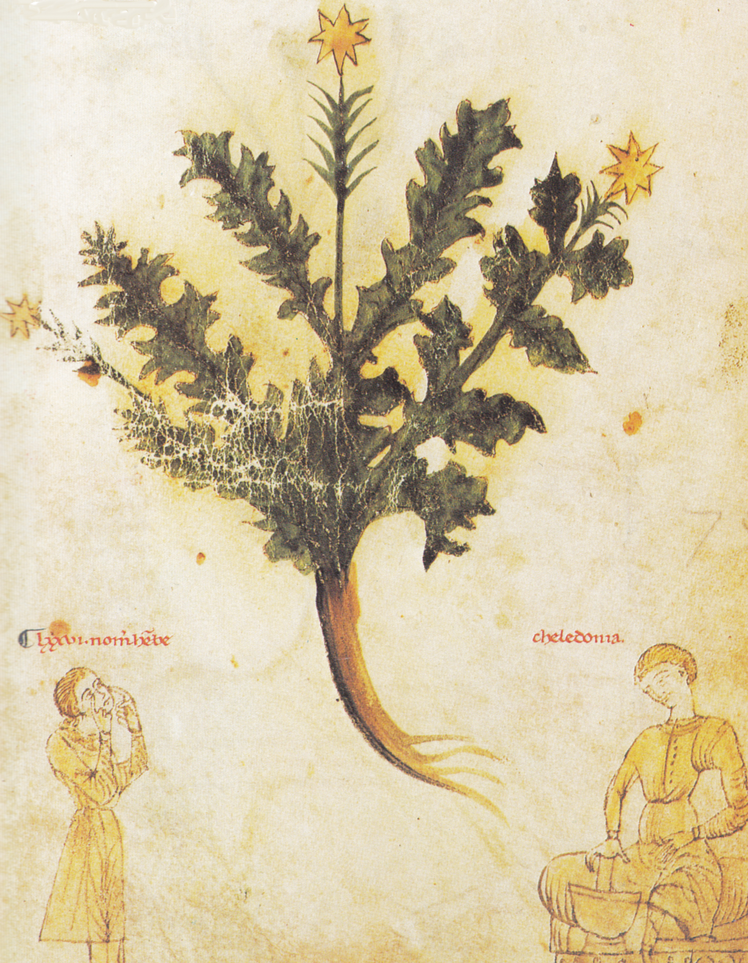 Abbildung von Chelidonia